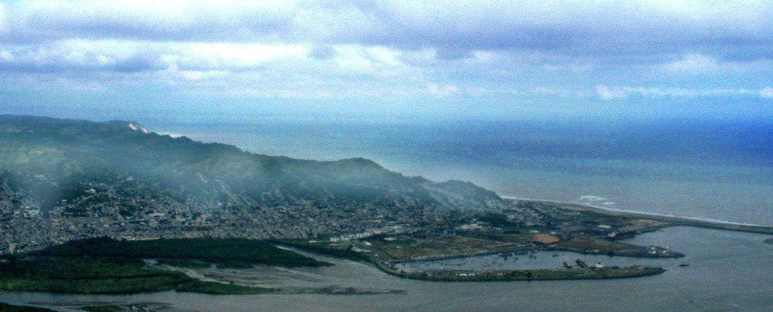 Norte de Esmeraldas